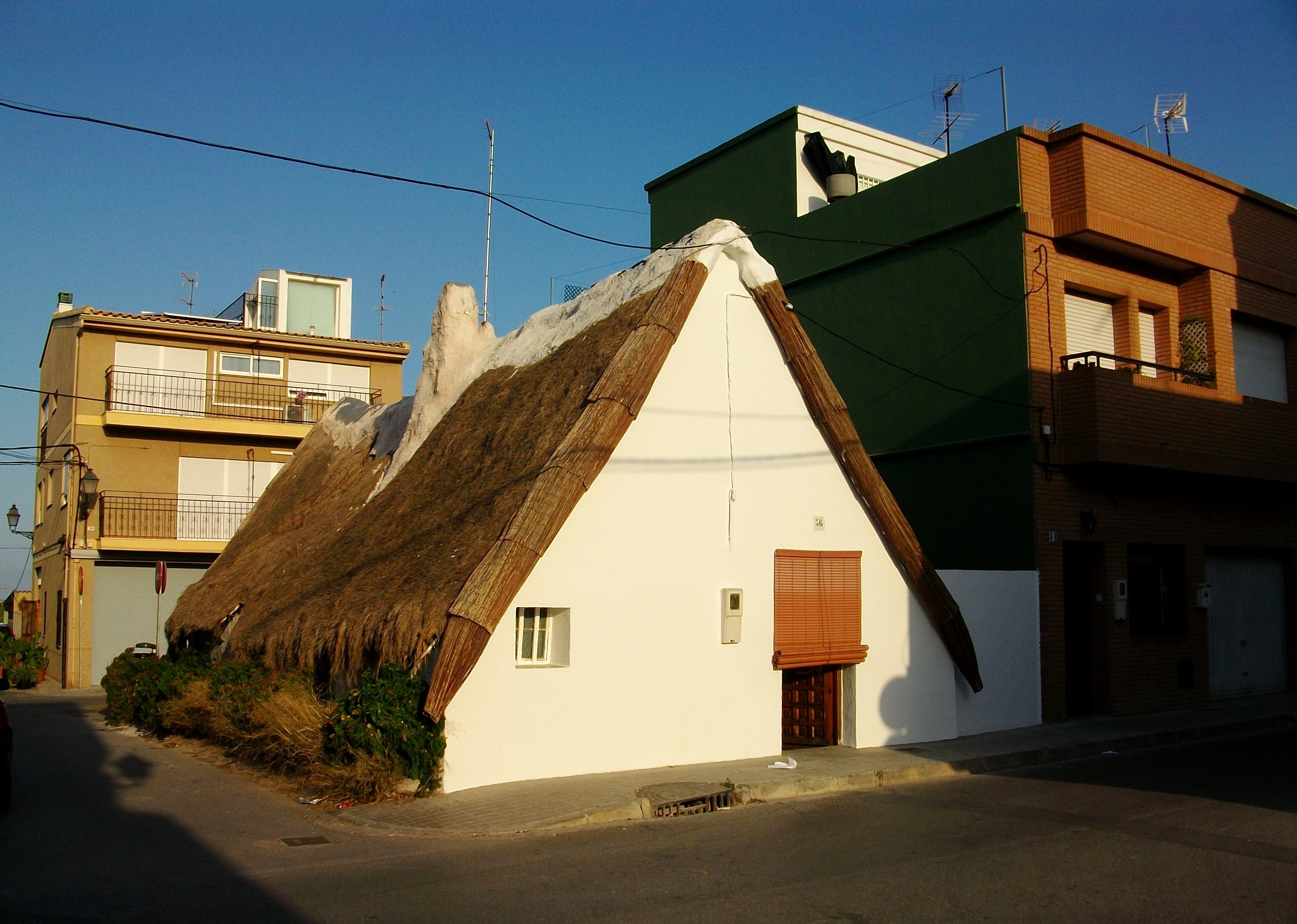 Barraca tradicional al Palmar, l'Albufera, País Valencià.